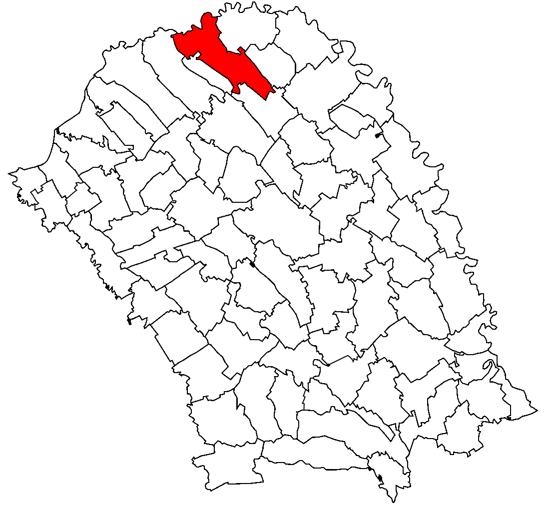 Categorie:Hărţi ale judeţului Botoşani